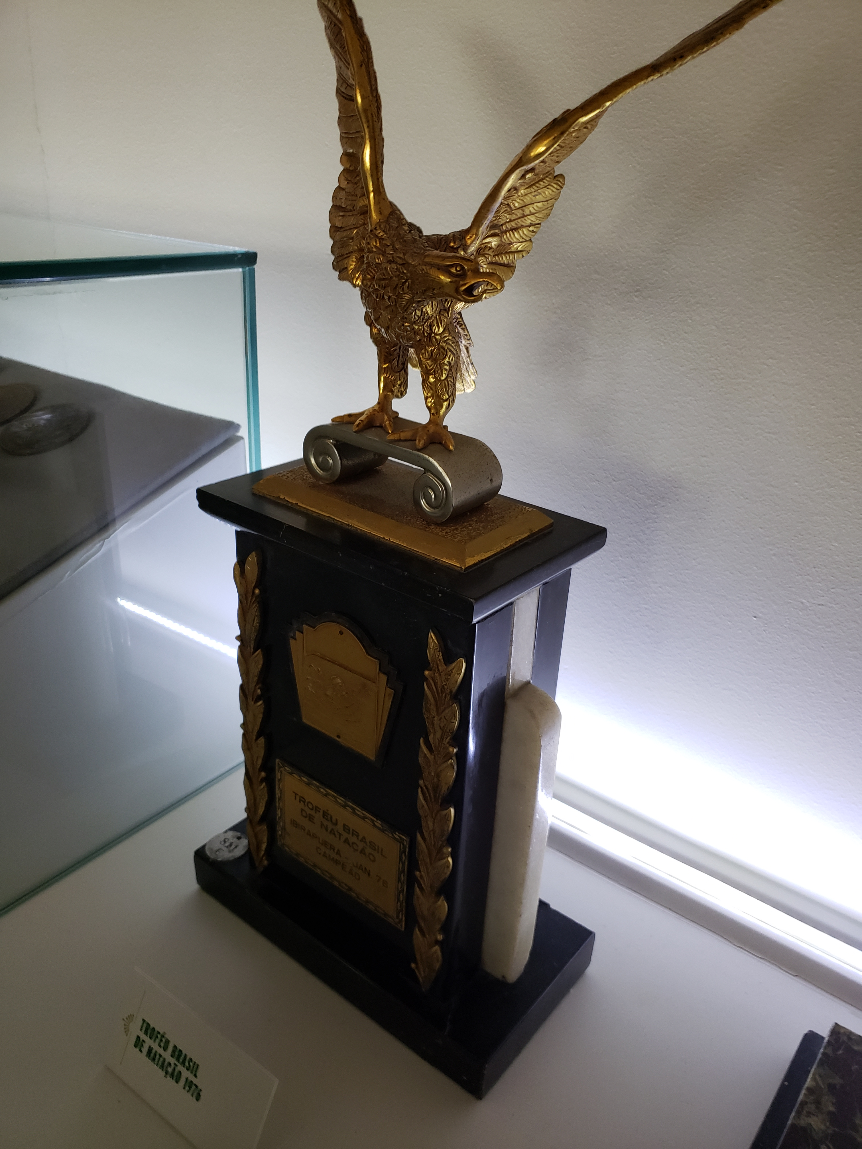 Troféu Brasil de Natação 1976, conquistado pelo Fluminense Football Club.